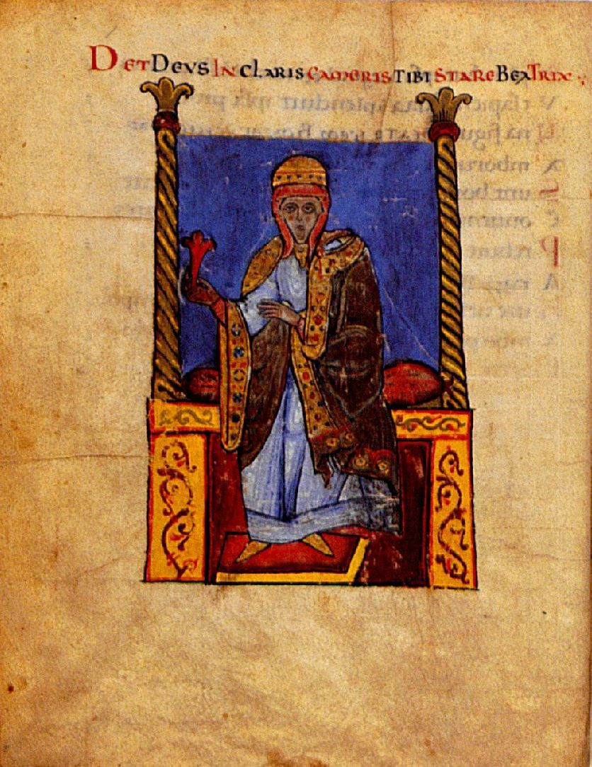 Mathildes Mutter Beatrix, Vita Mathildis des Donizo, um 1115. Vatikanstadt, BAV, Ms. Vat. lat. 4922, fol. 30v.